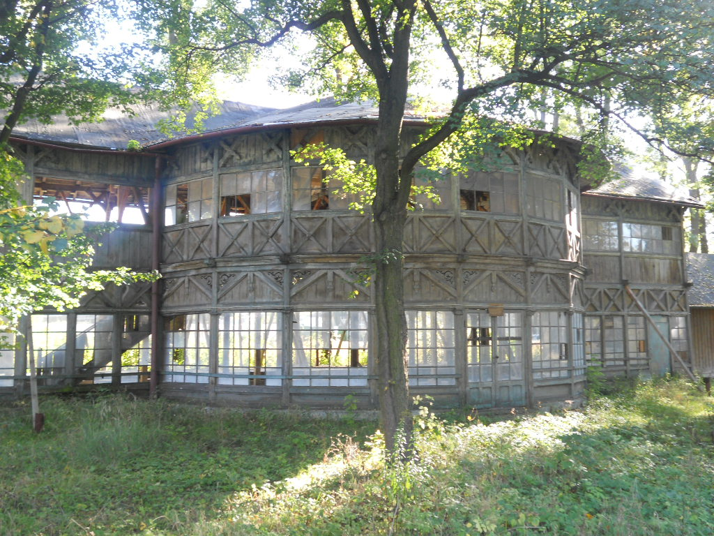 Zespół Strzelnicy Garnizonowej przy ulicy Królowej Jadwigi 220 w Krakowie (lata 80 XIX wieku).